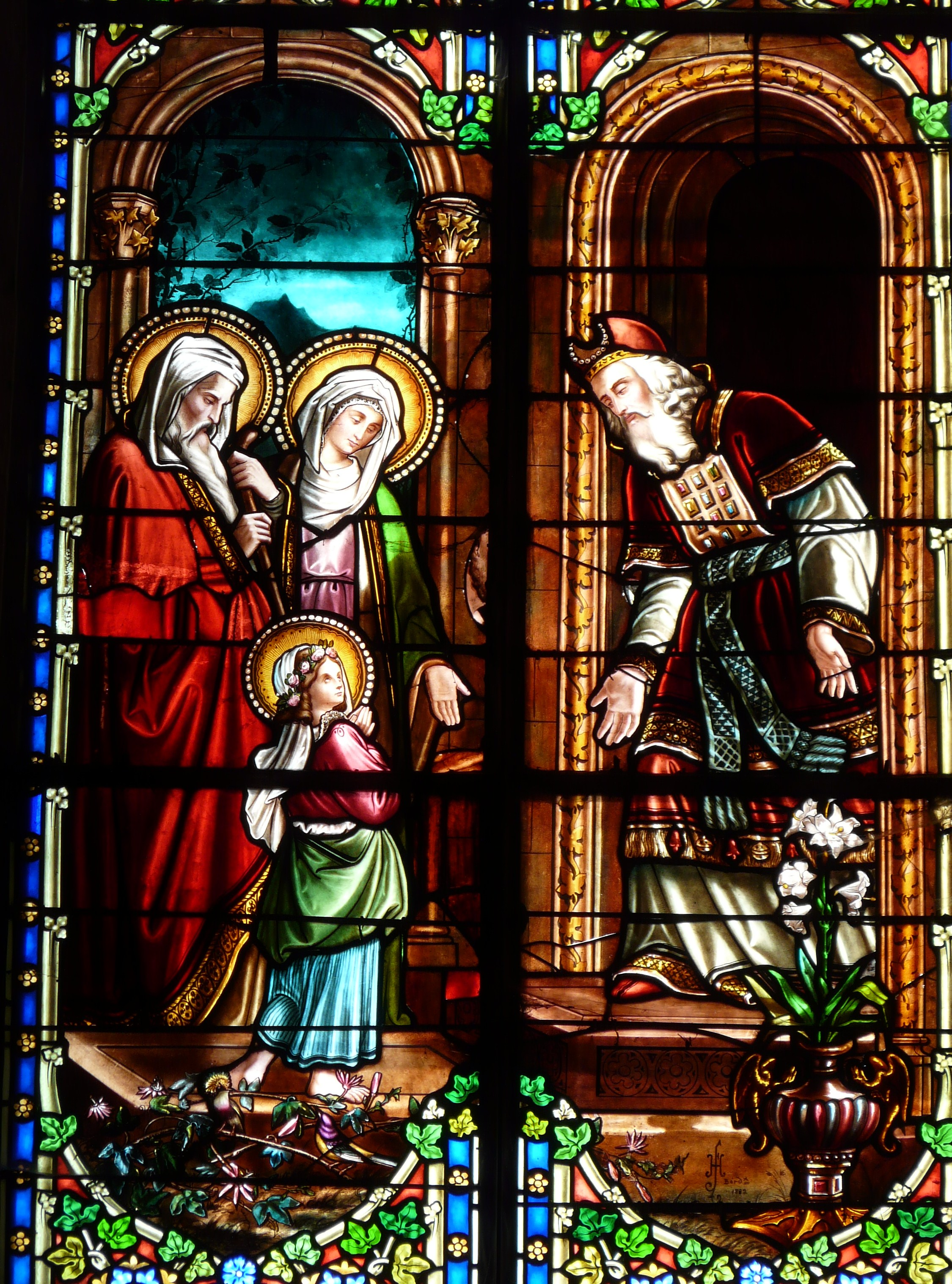 Représentation de la Présentation de Marie au Temple, œuvre d'Henri Feur, détail d'un vitrail de l'église Notre-Dame de la Nativité, Molières, Dordogne, France.